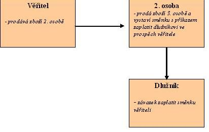 Dle zápisků ze střední školy